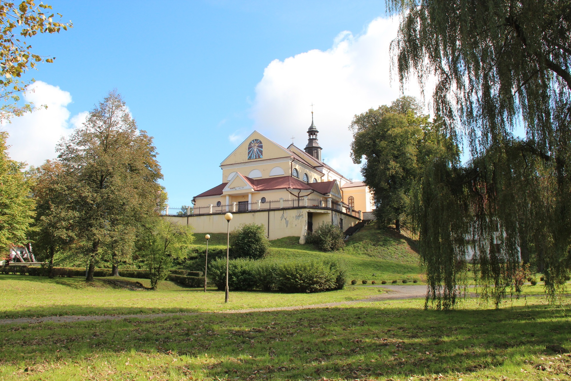 Bychawa - zespół kościoła par. p.w. św. Jana Chrzciciela